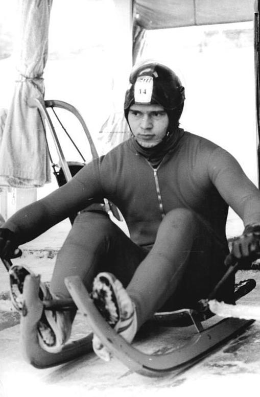 Detlef Günther ADN-ZB Olympia-Schaar 14.2.1980-Lake Placid: Rennschlittensport-Im Feld der 30 Herren-Einsitzer erzielte Dettlef Günther (DDR-Foto von einem früheren Wettkampf), der Goldmedaillengewinner von und in Innsbruck, mit 43,19 s neuen Bahnrekord. Er übernahm damit die Führung nach dem ersten Rennlauf.